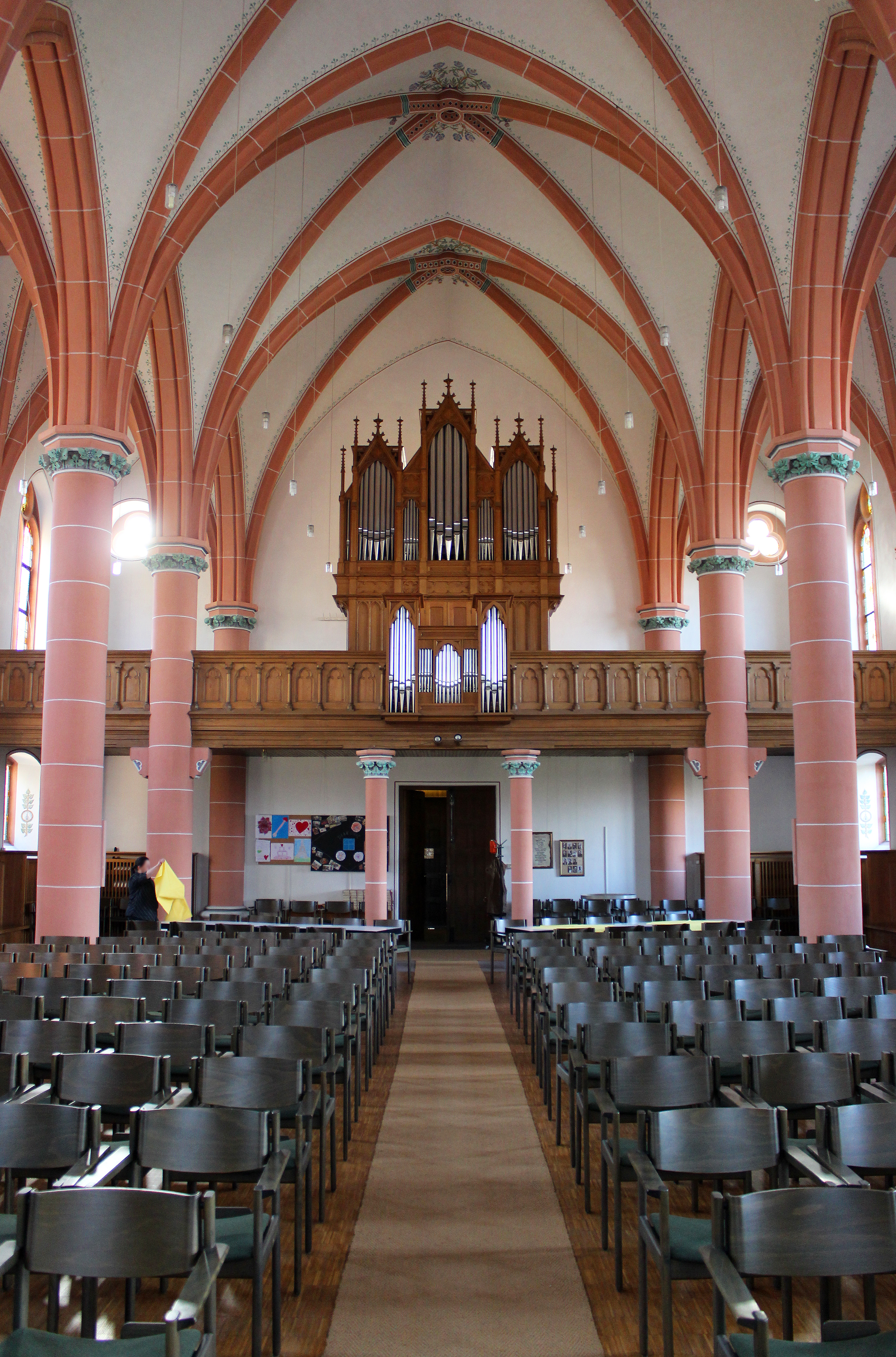 Blick ins Innere der evangelischen Kirche Elversberg, Landkreis Neunkirchen, Saarland